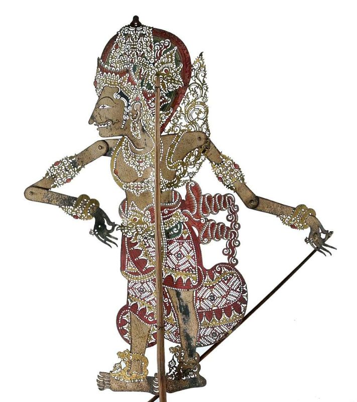 Schaduwfiguur. Wajangpop van karbouwenhuid, voorstellende Karna Unknown language: Wayang kulit